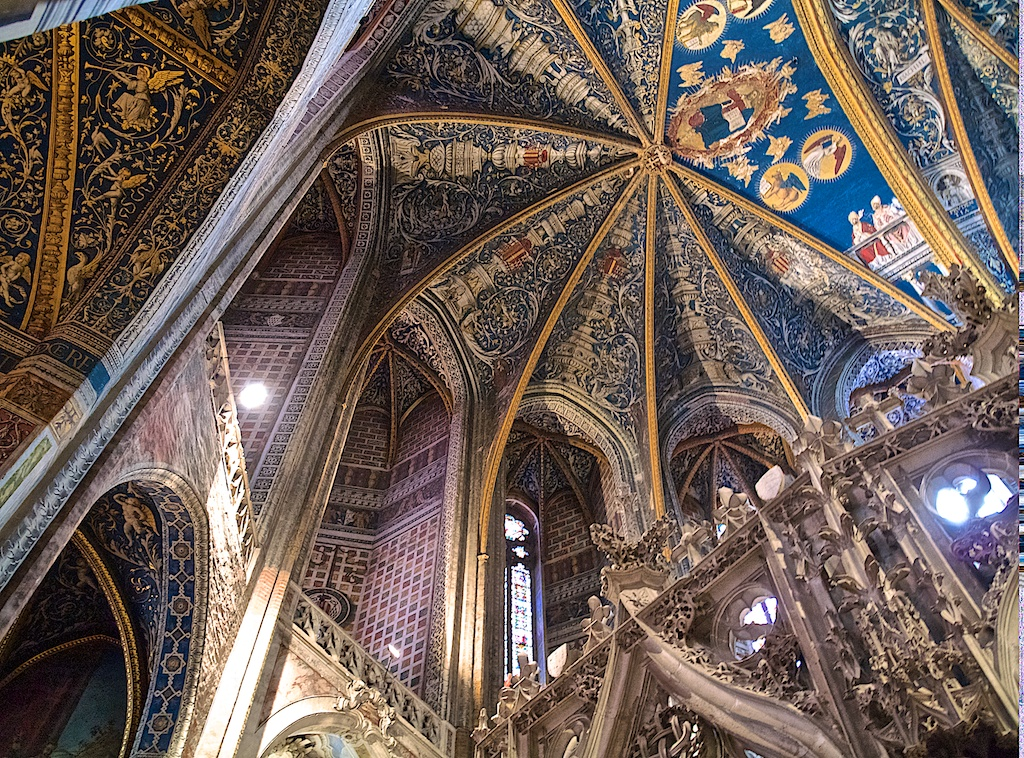 Cathédrale Sainte-Cécile